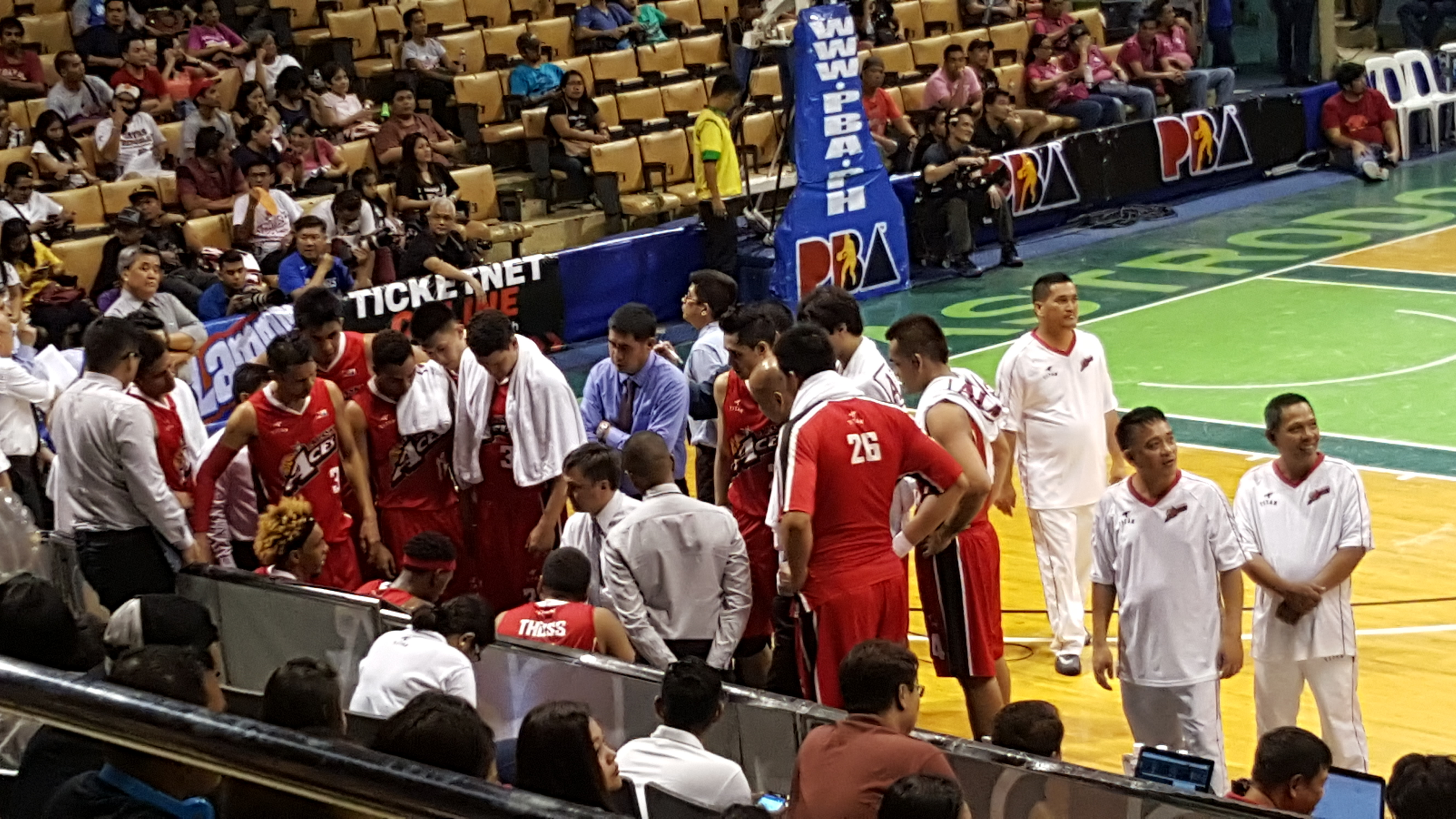 PBA - Alaska vs TNT - Alaska bench - 2016-0417